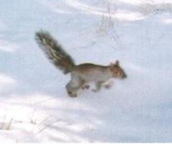 Arizona gray squirrel (Sciurus arizonensis)